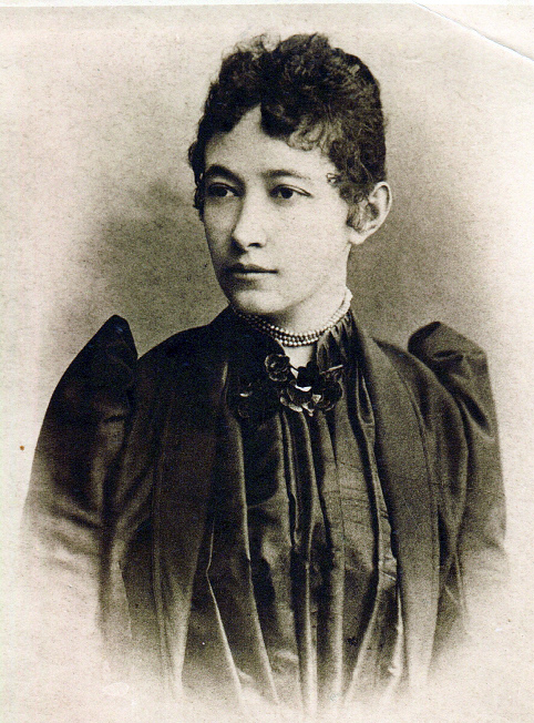 Уляна Кравченко (Юлія Шнайдер)